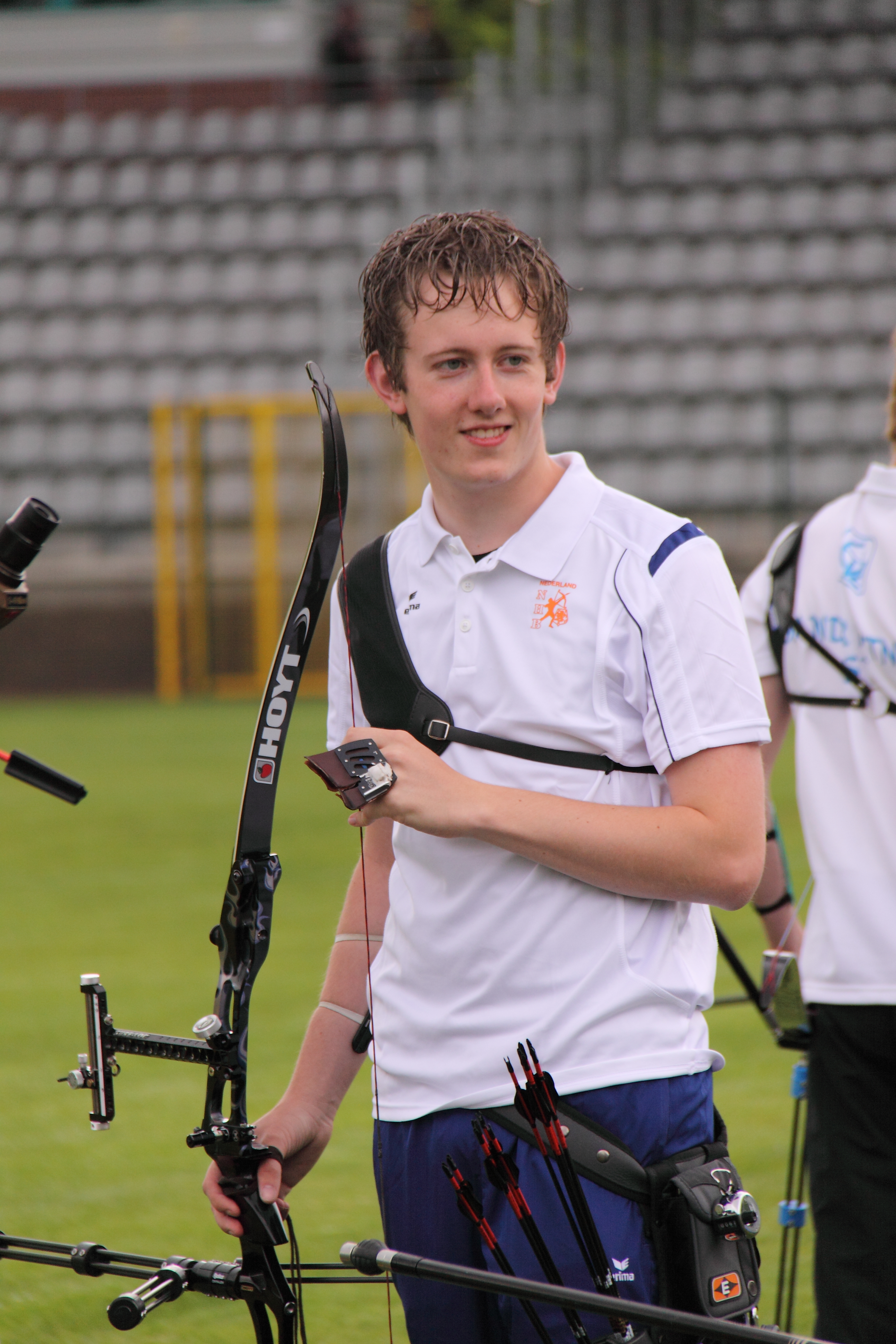 Rick van der Ven, Nederlandse Handboogschutter